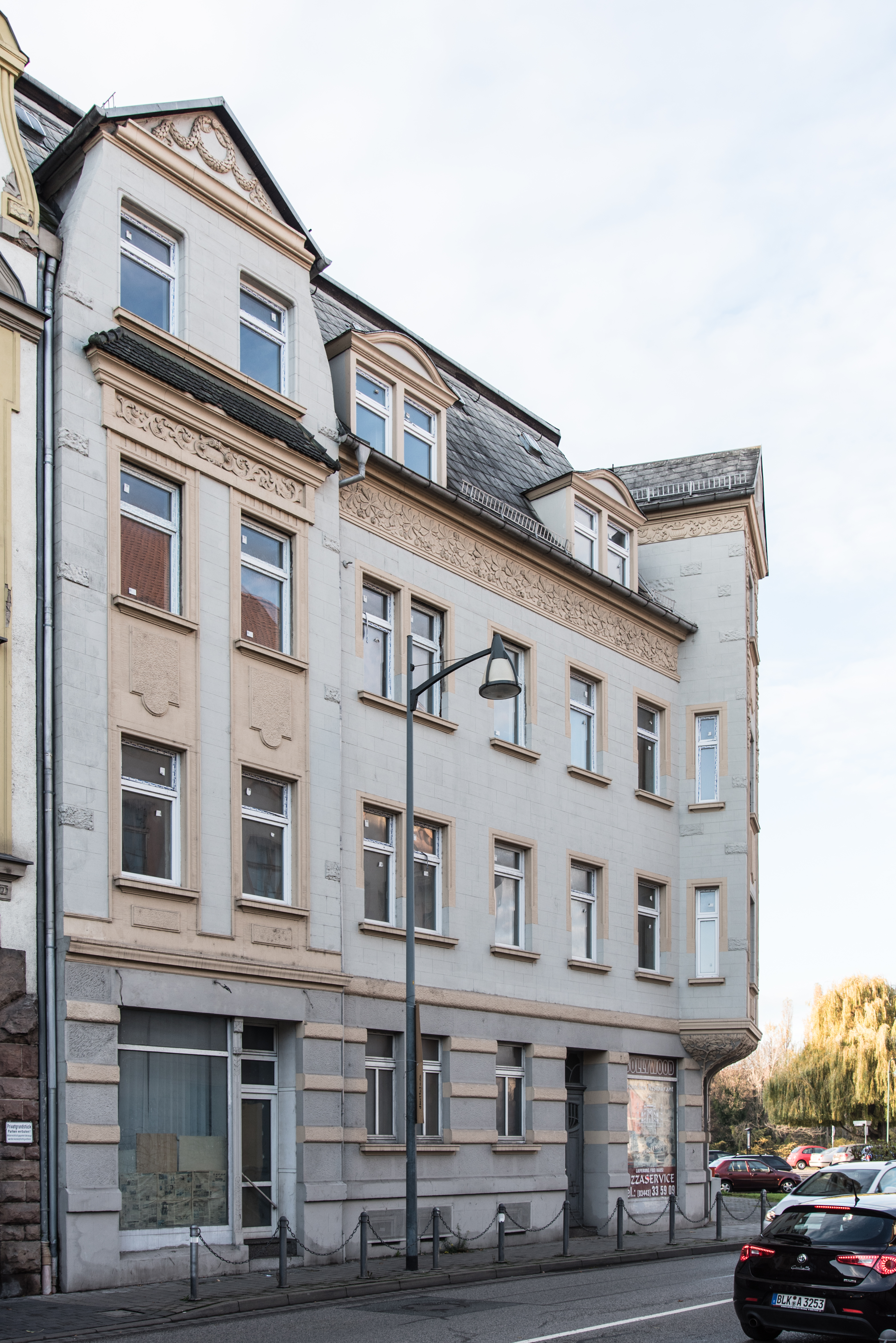 Weißenfels, Friedrichstraße 3